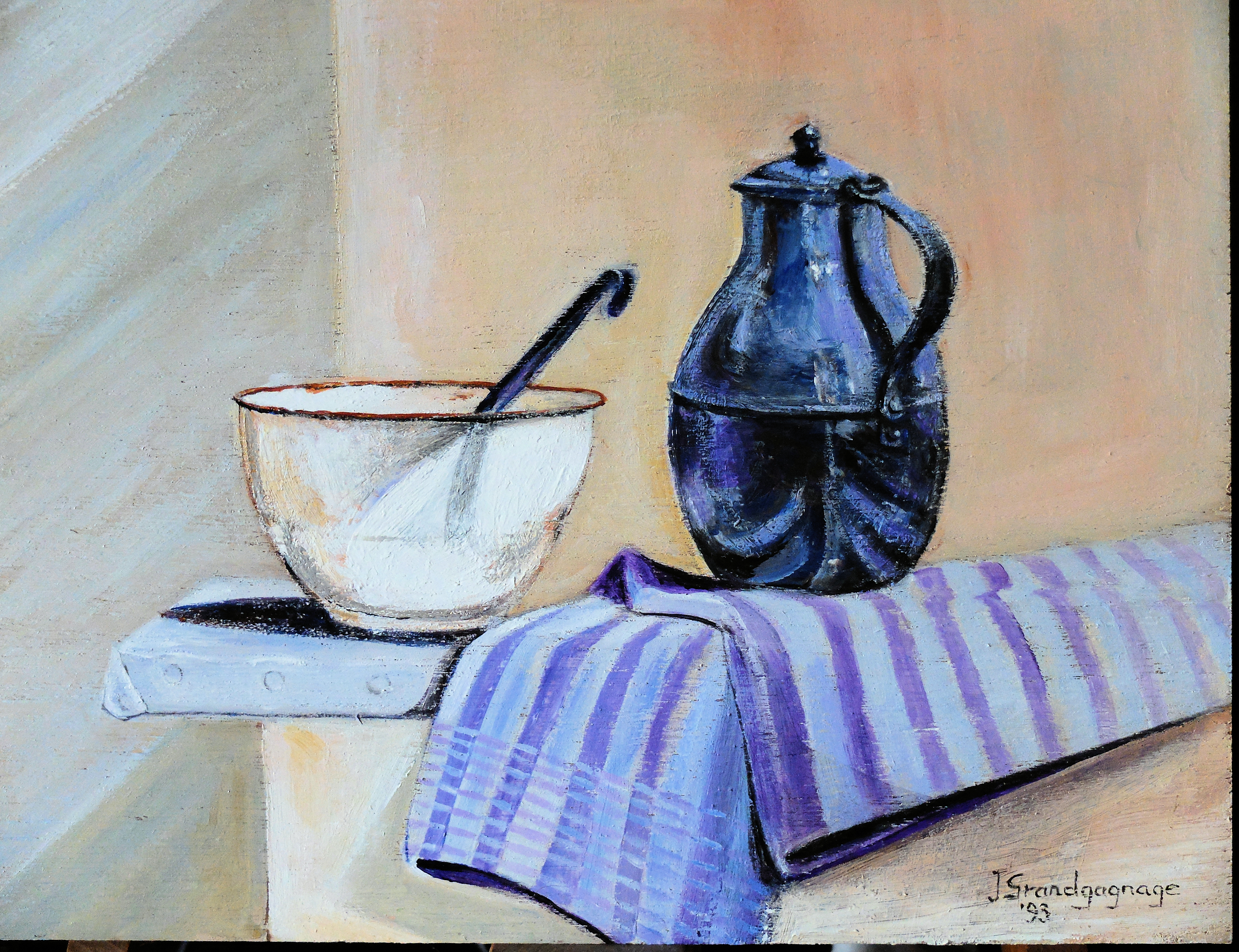 Schilderij in acrylverf van Julien Grandgagnage (1993). 30x24